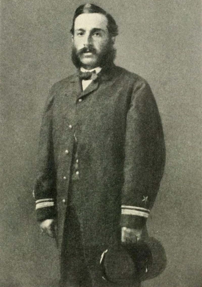 George Dewey